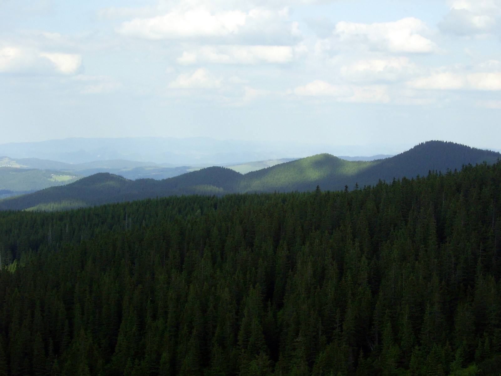 Przednia, Średnia i Zadnia Kopa Sołtysia, Ostry Wierch z okolic Przełęczy między Kopami